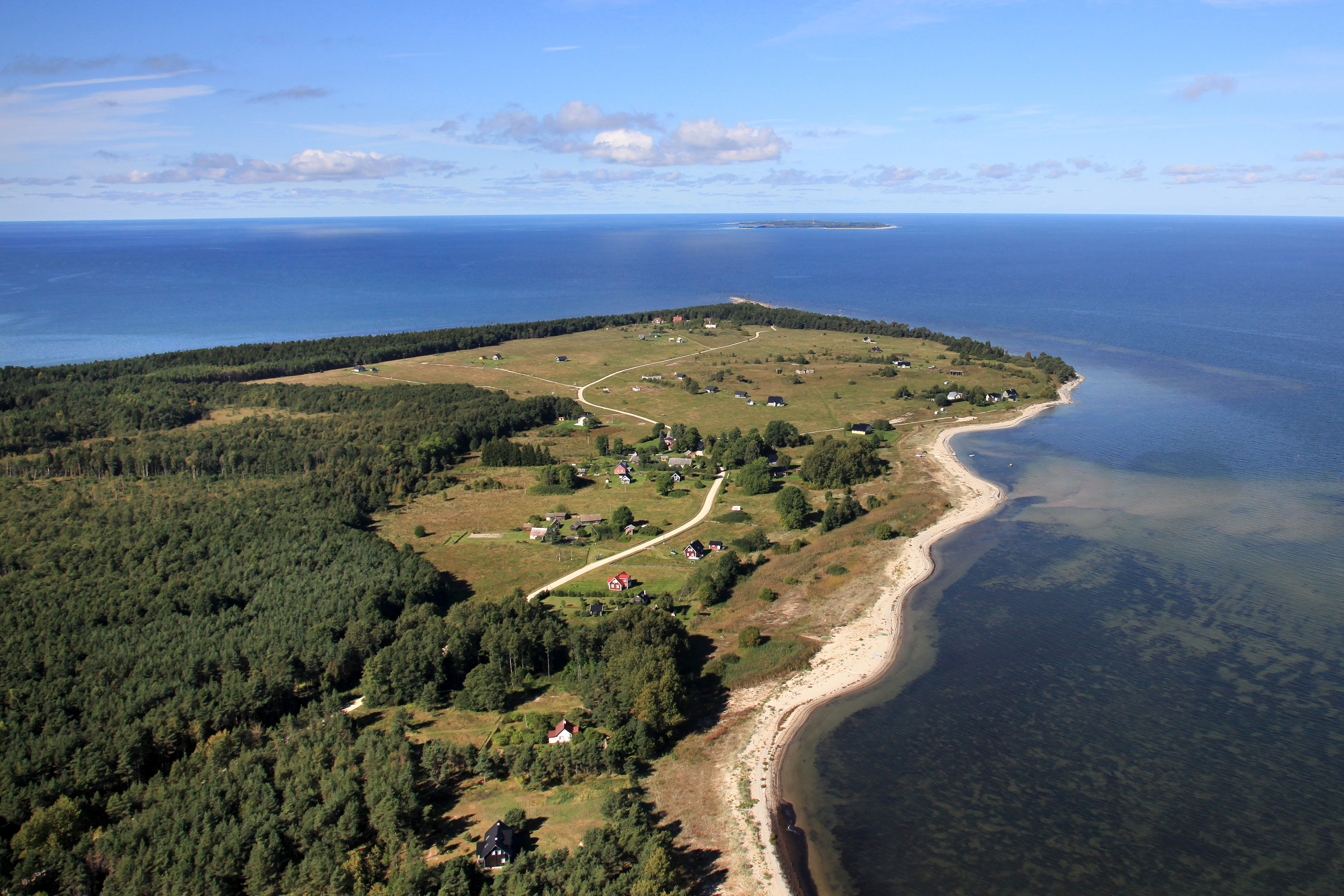 Põõsaspea neem, Osmussaar